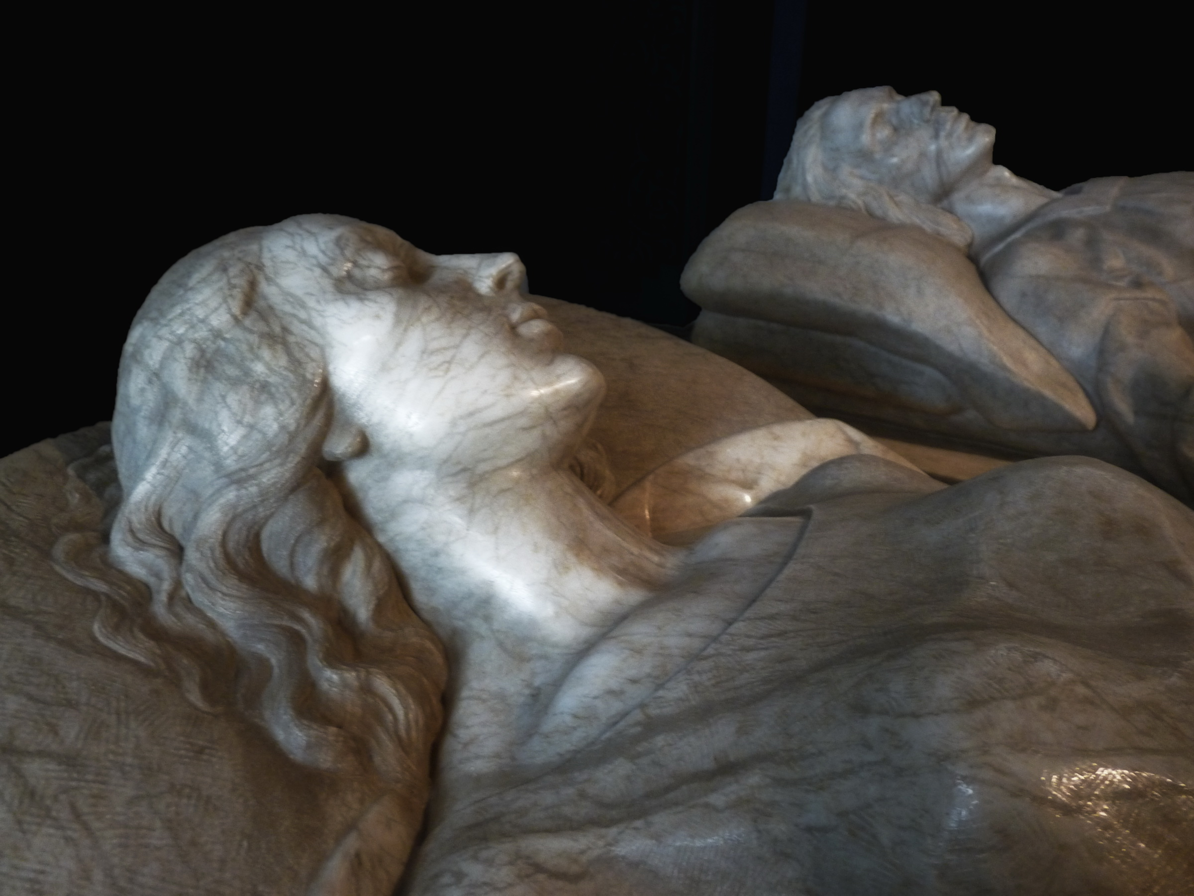 Los Amantes de Teruel